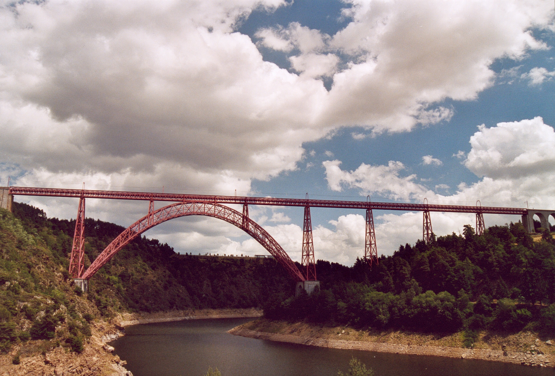 France Cantal Viaduc de Garabit Photographie prise par GIRAUD Patrick